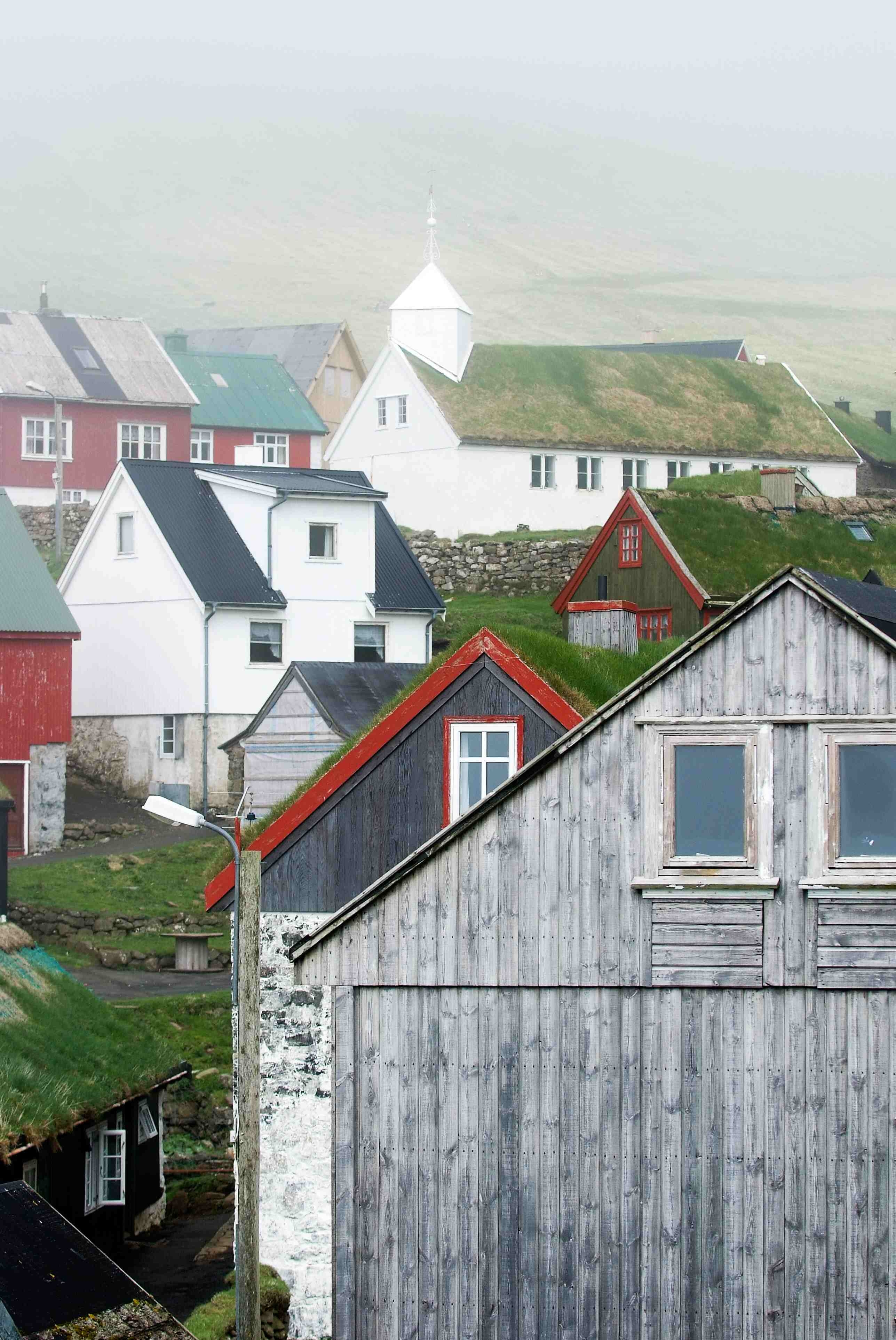 Mykines, Faroe Islands